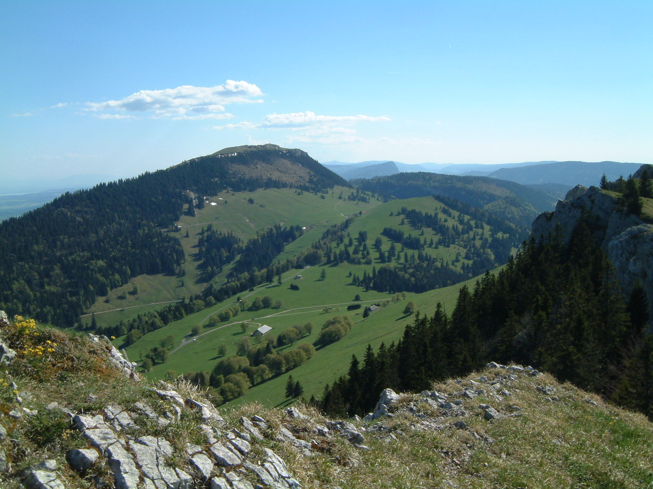 Le Suchet, view from mont de Baulmes (Switzerland)